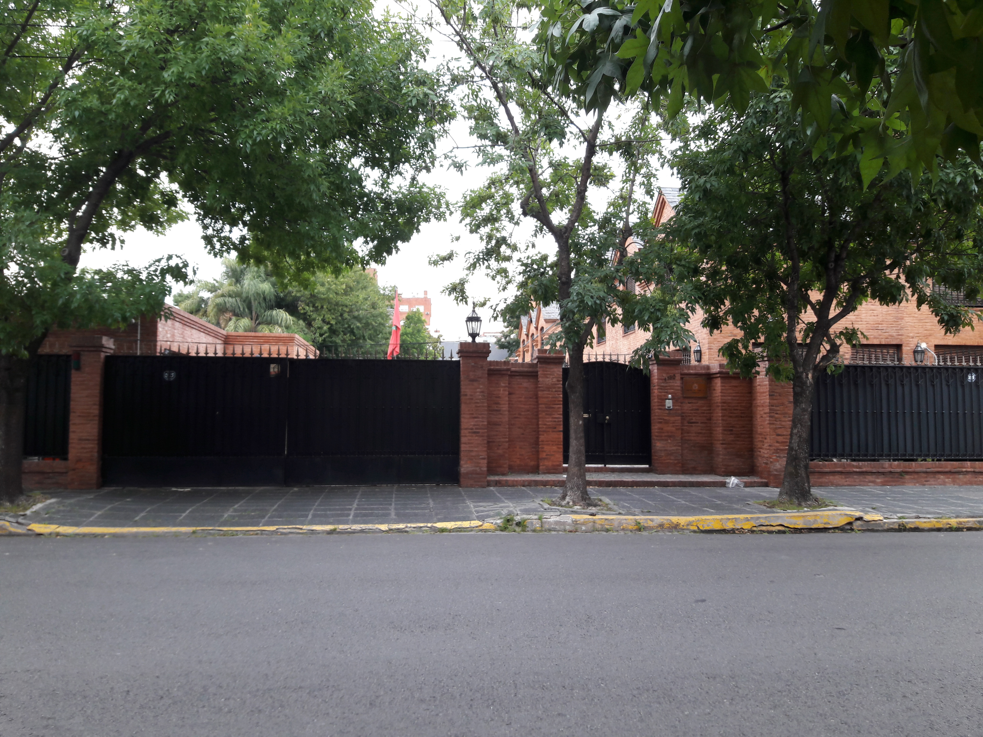 Residencia del Embajador de Marruecos, Belgrano, Buenos Aires, Argentina.